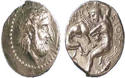 Ликеј